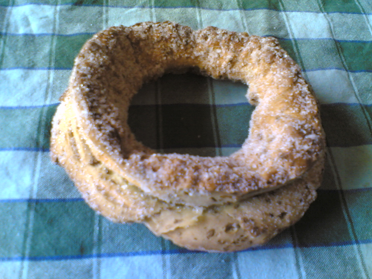 Ciambellino Bollito di Sinalunga alta (Boiled Ciambellino from Sinalunga, Italy)